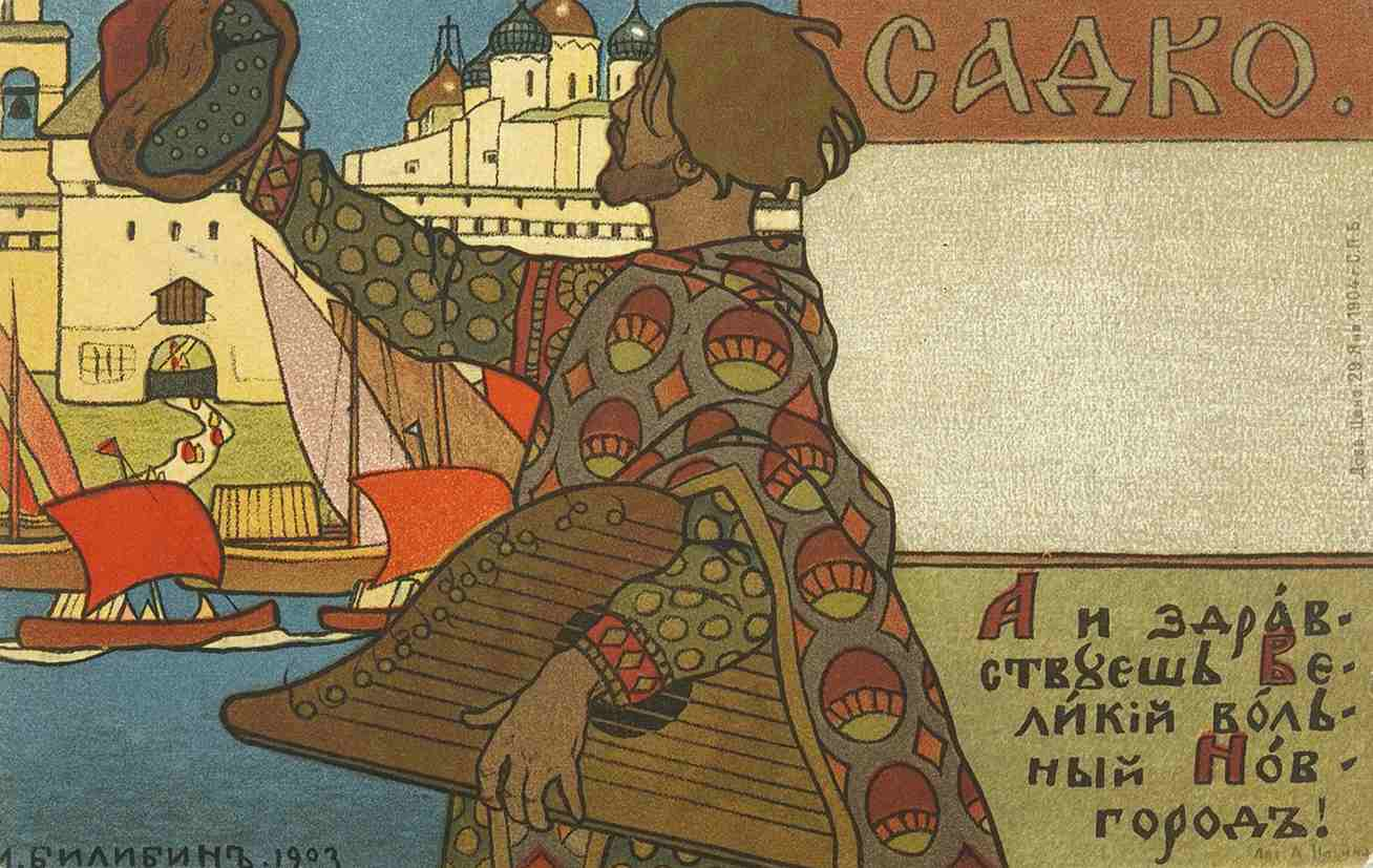 Садко. 1903. Открытка издания "Общины св. Евгении". №505. Из коллекции Э.Б. Файнштейна